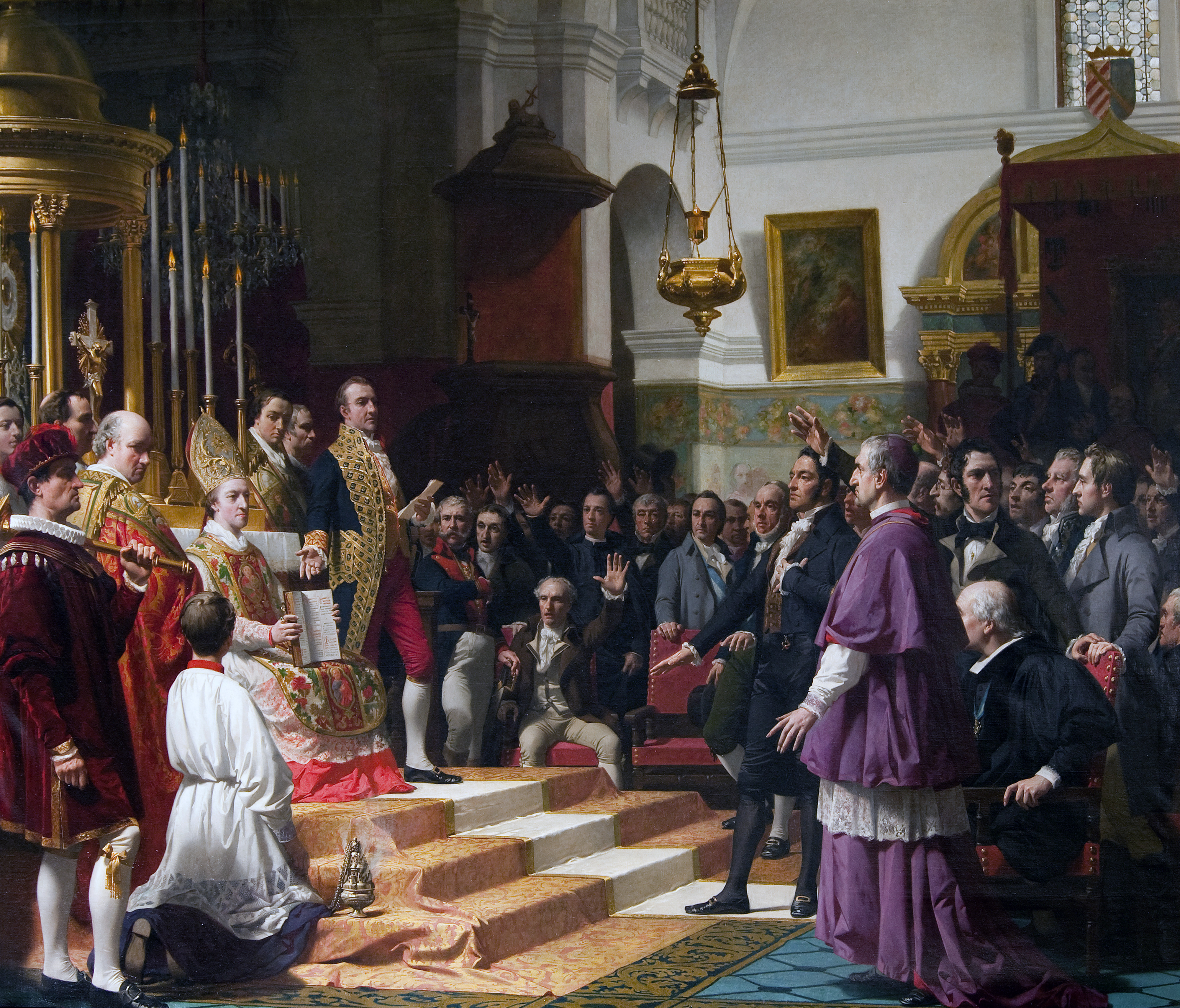 El día 24 de septiembre de 1810, durante el sitio de Cádiz, en el contexto de la Guerra de Independencia Española, los diputados que redactaron la Constitución Española de 1812 juraron lealtad en la iglesia de San Pedro y San Pablo de San Fernando. Este hecho quedó inmortalizado por el pintor José Casado del Alisal, cuyo cuadro está expuesto en el Congreso de los Diputados de España.